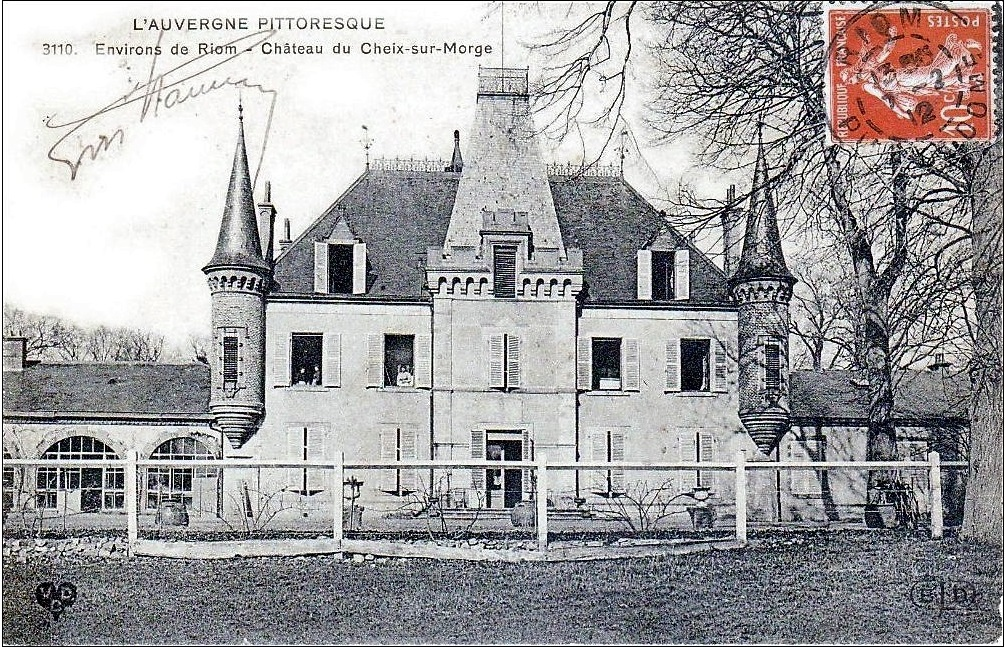 31110 - Environ de Riom - Château de Cheix-sur-Morge